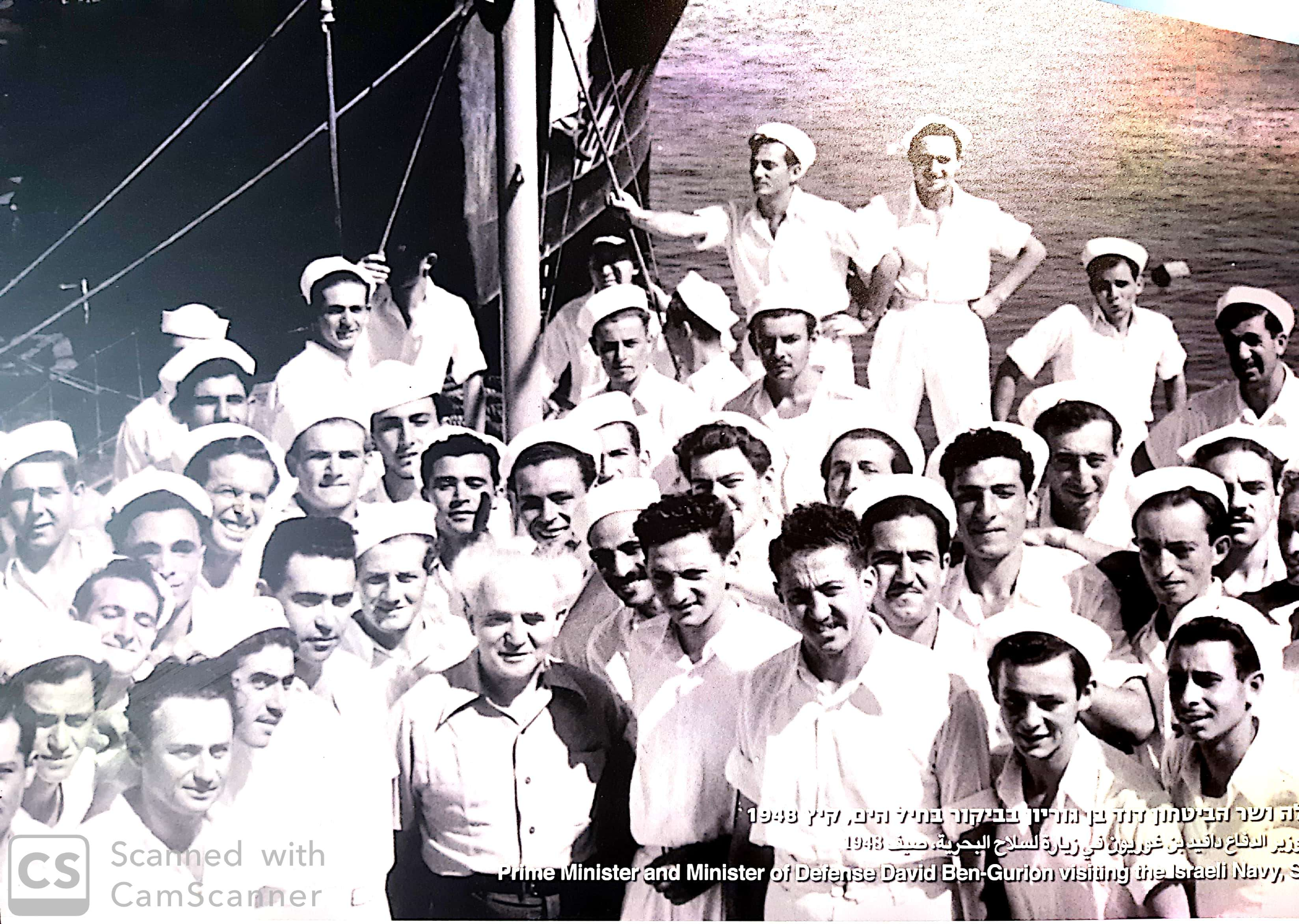 ראש הממשלה דוד בן גוריון מבקר בחיל הים במהלך מלחמת העצמאות מימינו ישראל אוירבך